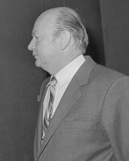 Hongaarse minister Peter Varkonyi, bezoekt Rijksmuseum 10 July 1985